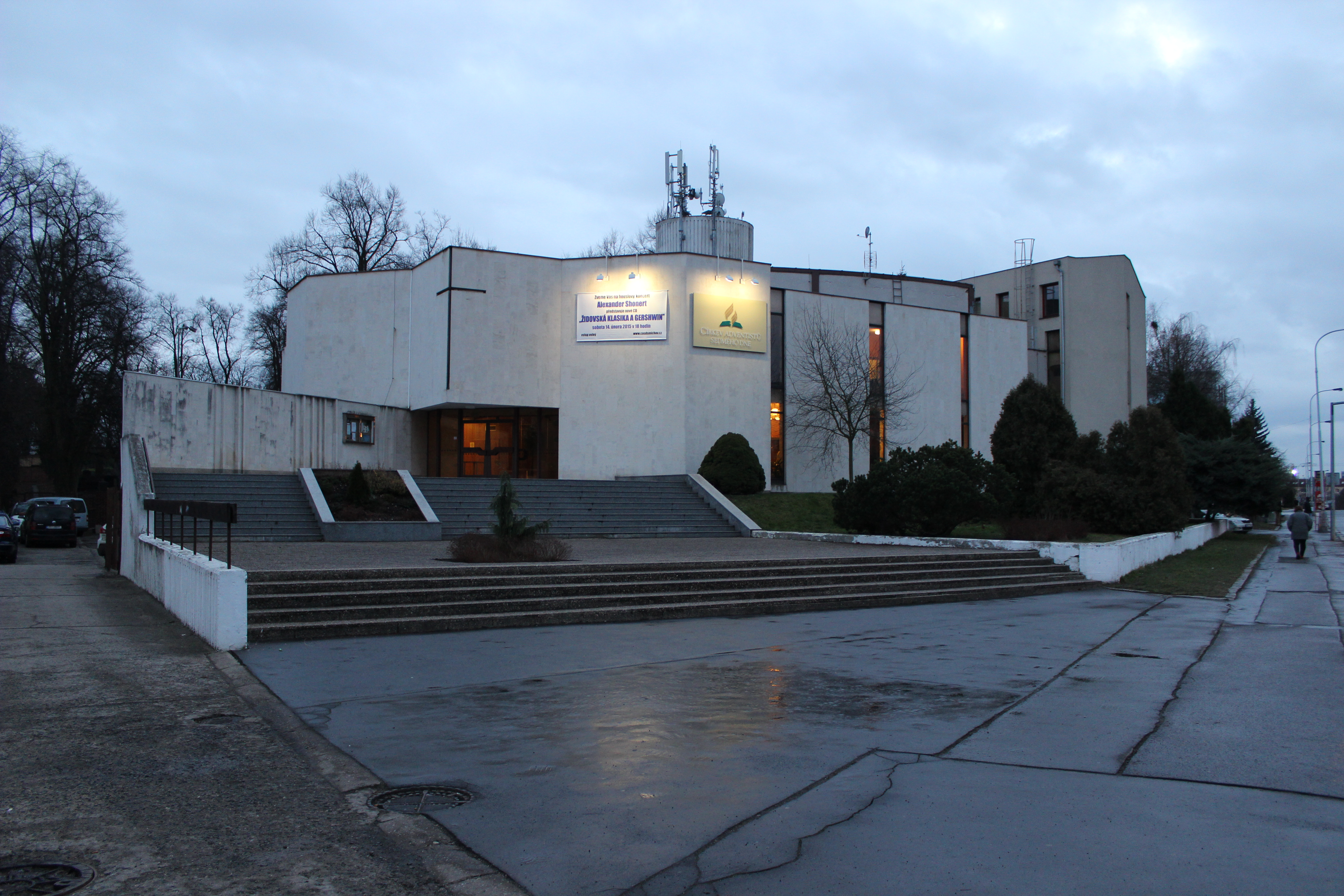 Modlitebna sboru církve Adventistů sedmého dne v Praze 5-Smíchově (pohled od severu).